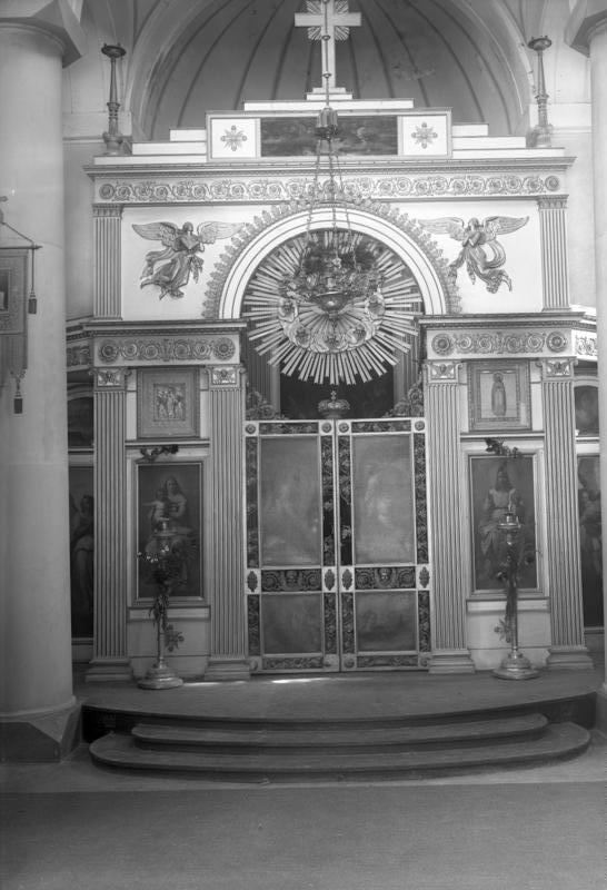 Ein russischer Kirchenschatz in Berlin! Der wertvolle Altar, ein Geschenk des ermordeteten russischen Zaren, in der Kapelle des "Heiligen Alexander Newski" in Potsdam bei Berlin